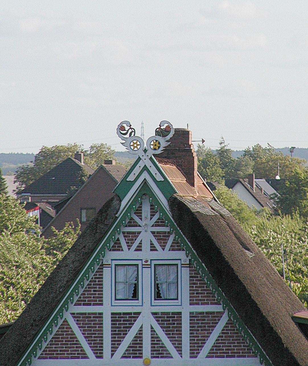 Giebelkreuz in Grünendeich Altes Land!